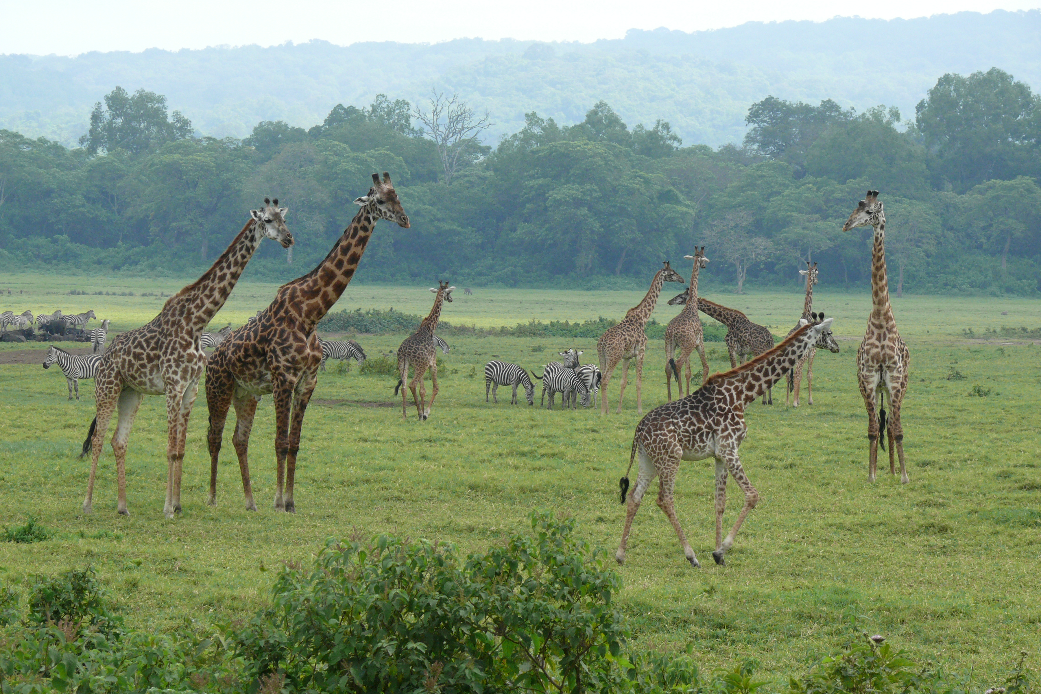 Little Serengeti im Arusha Nationalpark